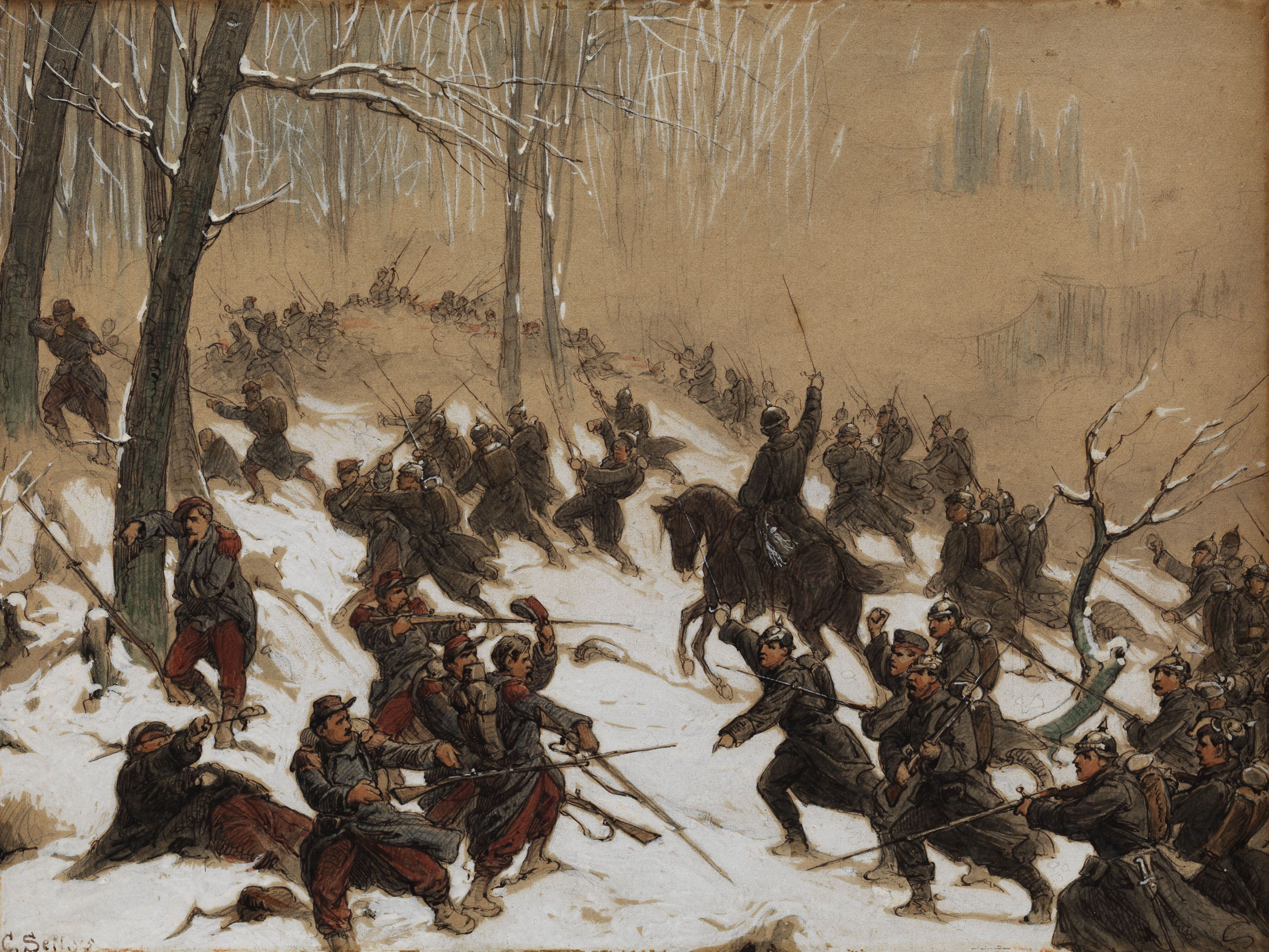 Winterliche Kriegsszene aus dem Krieg 1870–1871. Farbige Gouache auf Karton auf Holz. 19 x 26 cm. Links unten signiert und datiert „(18)95“.